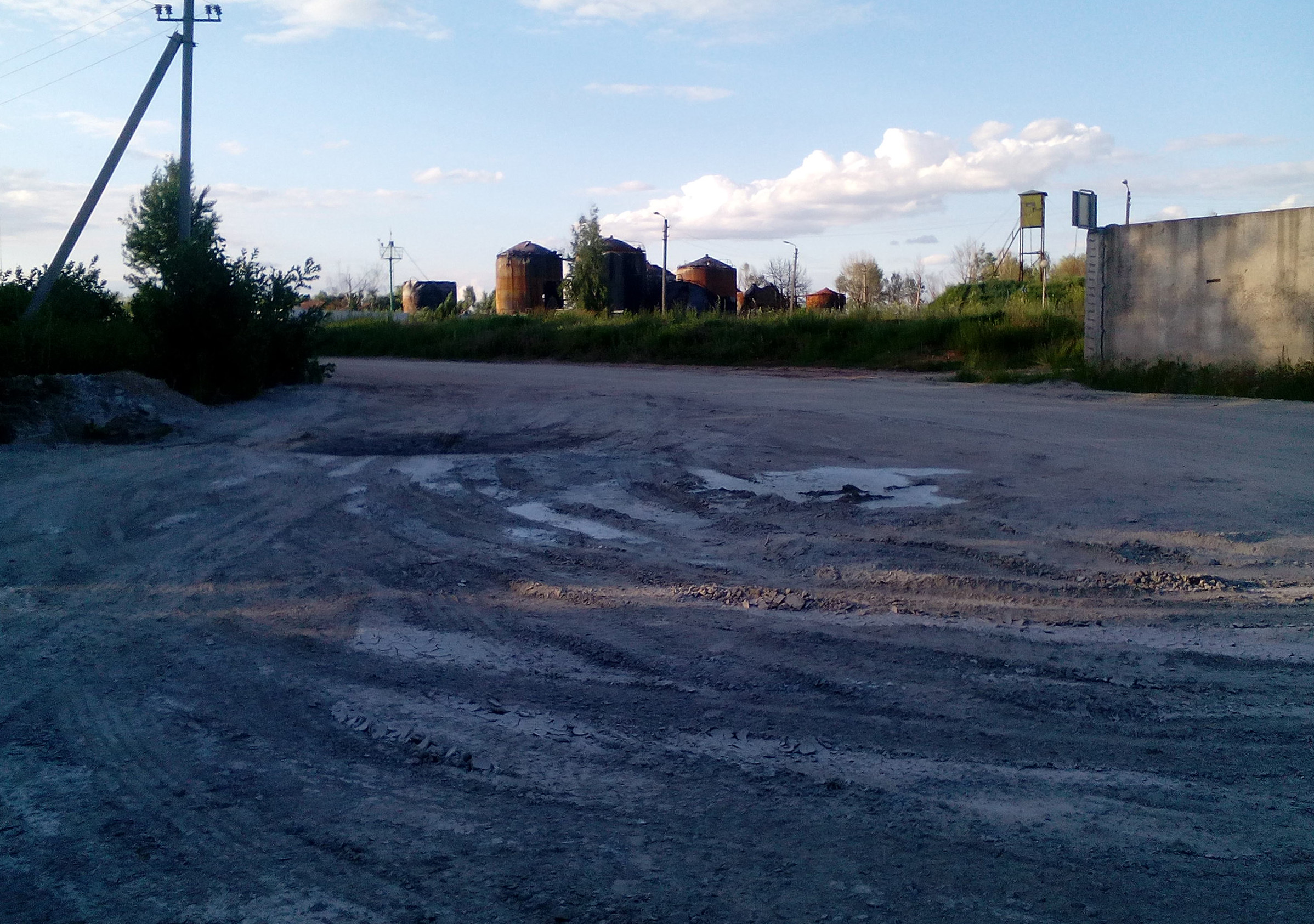 Згоріла нафтобаза у Васильківському районі Київської області.